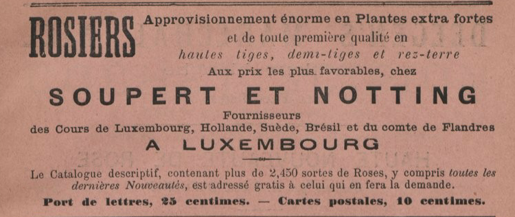 Publicité pour Soupert & Notting dans le Journal des roses, décembre 1896.